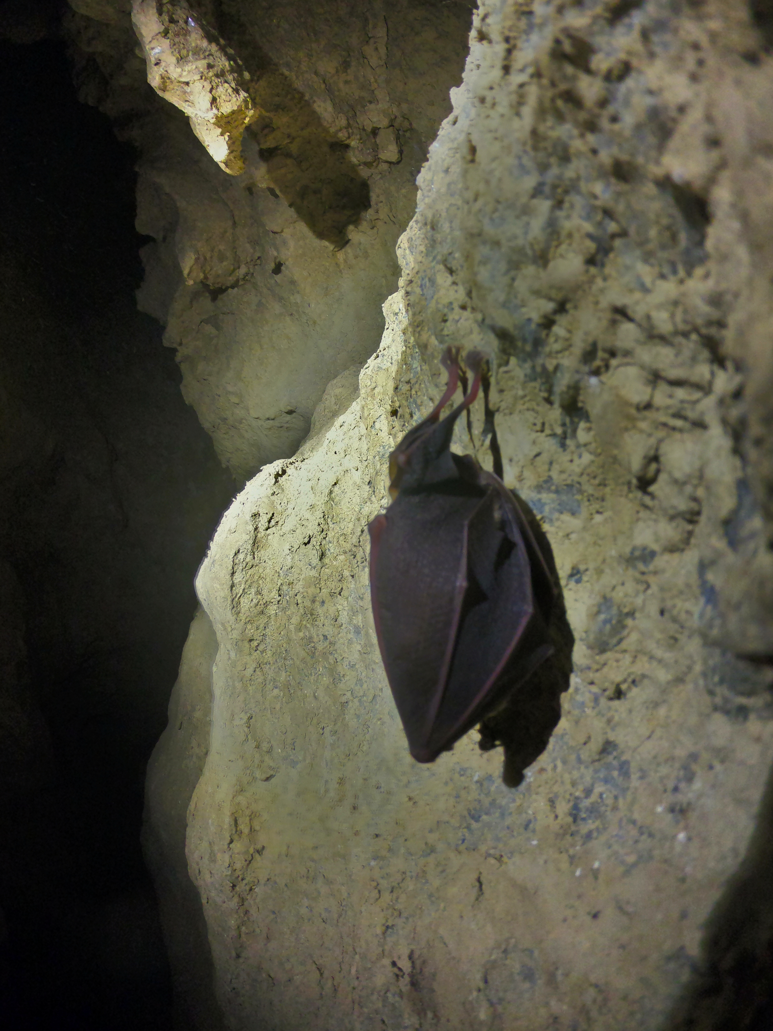 Ferro di cavallo minore in stato di ibernazione invernale